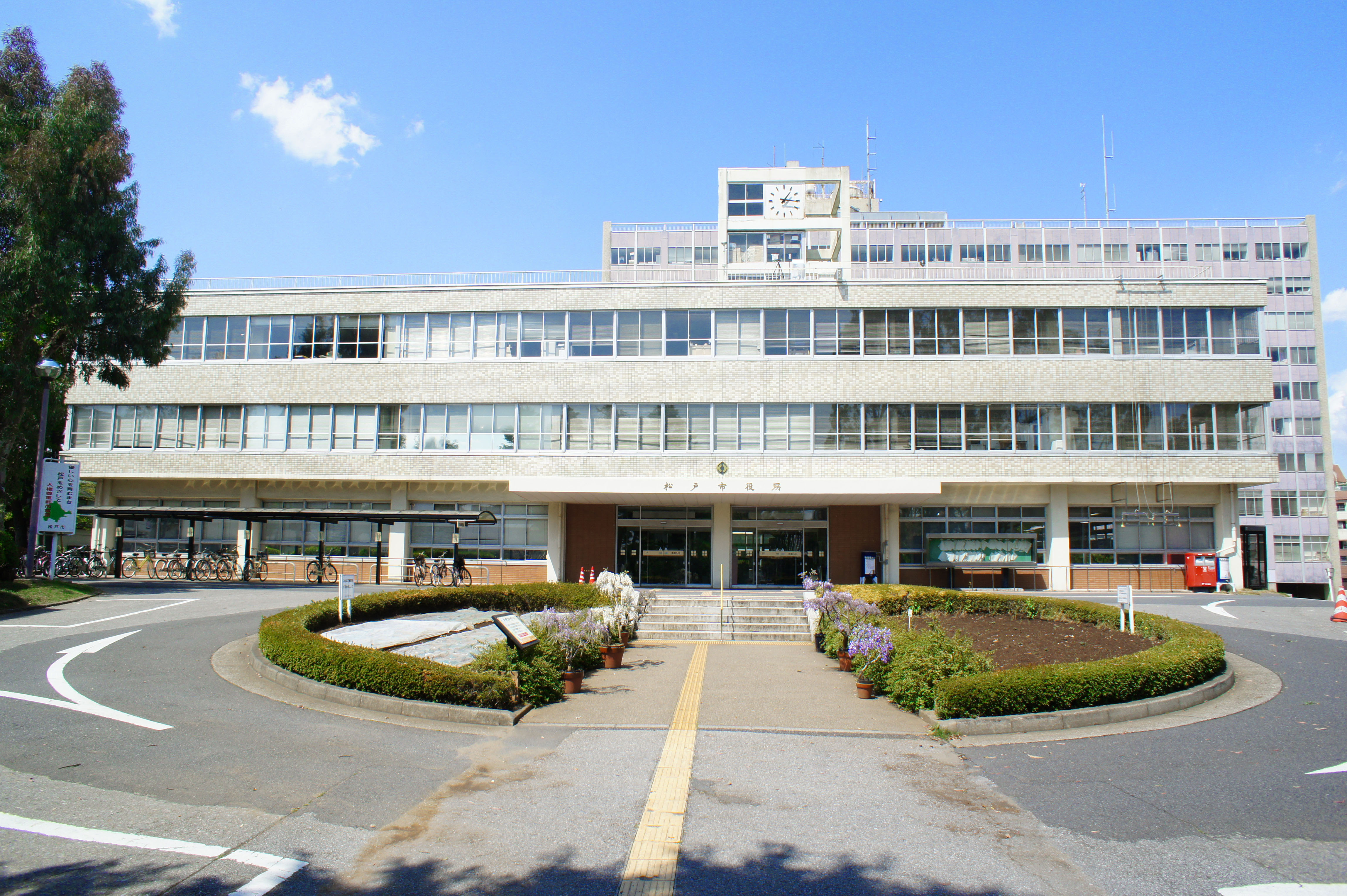 松戸市役所。